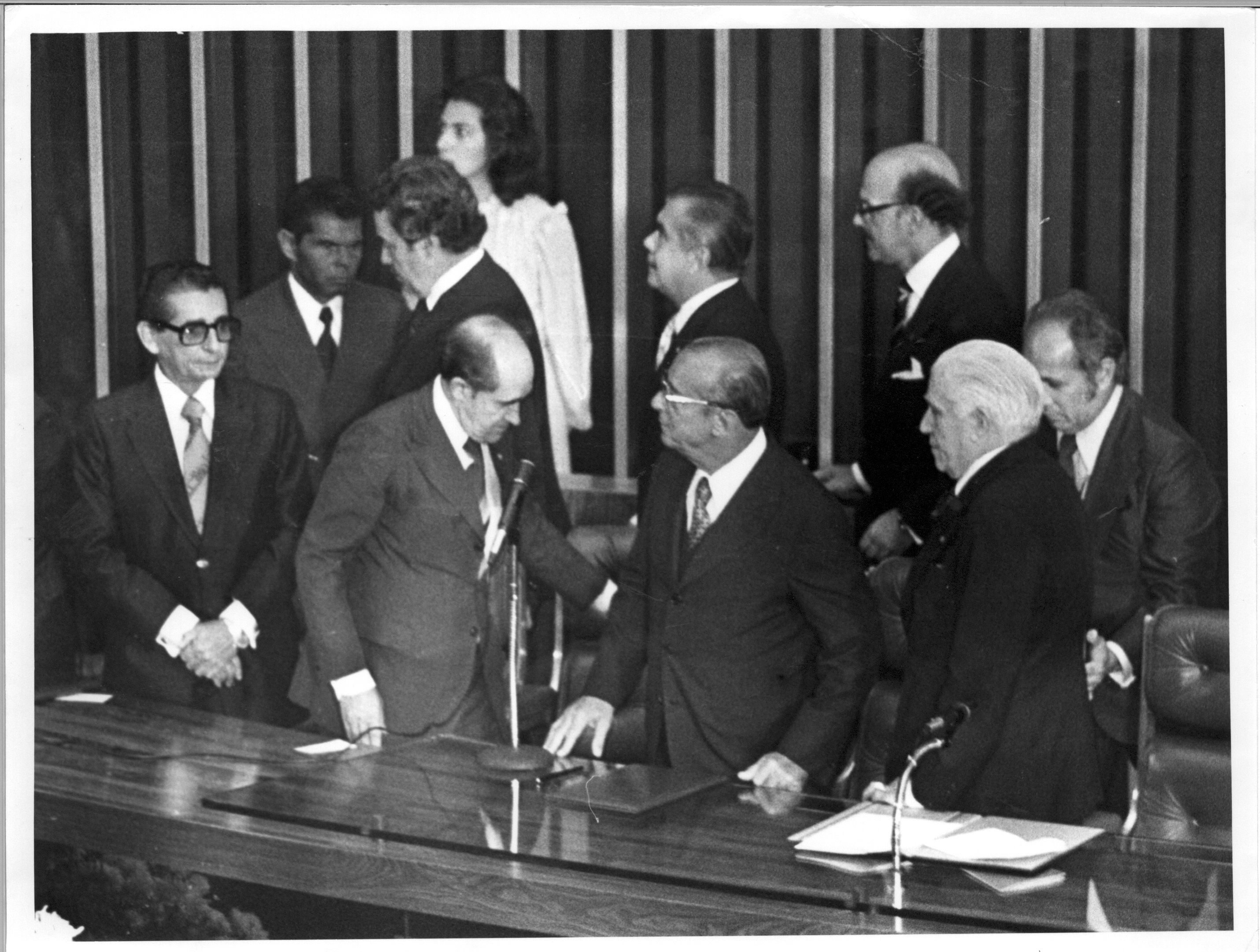 Posse do presidente João Figueiredo em 15 de março de 1979, em sessão conjunta do Congresso Nacional, presidida pelo Senador Luís Viana. O mandato presidencial, de acordo com a Emenda Constitucional nº 08/77, passou a ser de 6 anos. João Figueiredo foi o último dos Presidentes Militares. Foi eleito por eleição indireta. Foto: Senado Federal